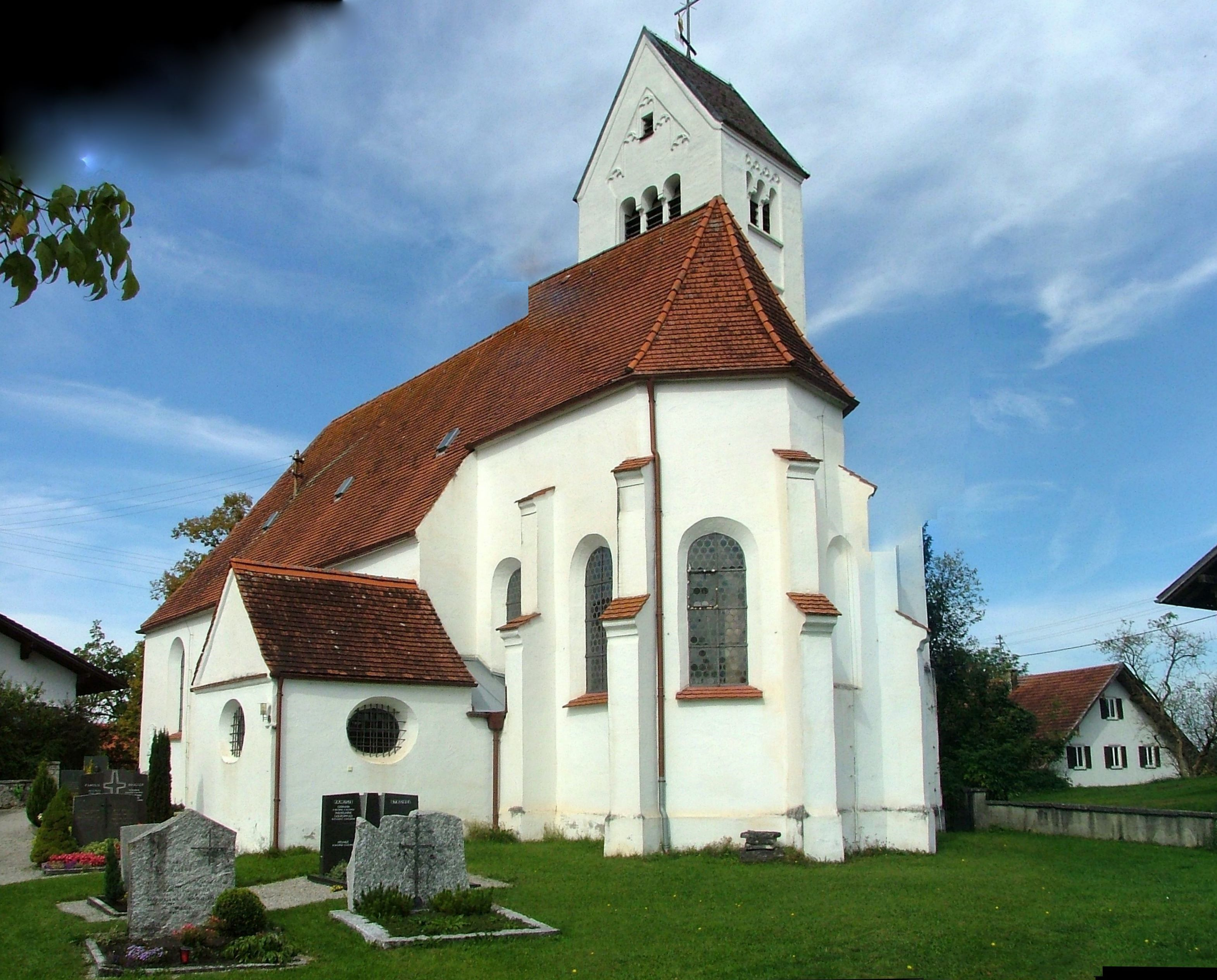 Burk